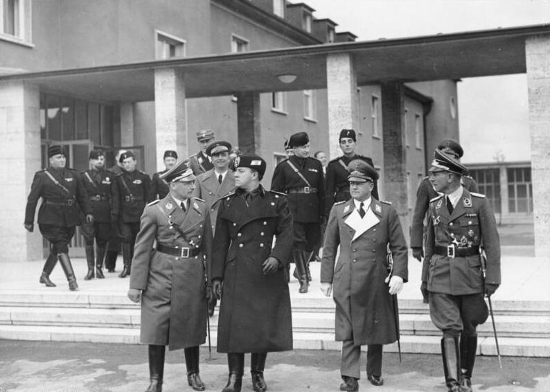 Scherl: Graf Ciano besichtigte heute den Fliegerhorst Gatow die Luftkriegsschule, Lufttechnische- und Luftkriegs-Akademie. Im Gelände der Luftkriegsschule, von links: der Kommandeur Oberst Schulz, Graf [Galeazzo] Ciano, General der Flieger [Erhard] Milch. Aufnahme: Hoffmann 15116-36